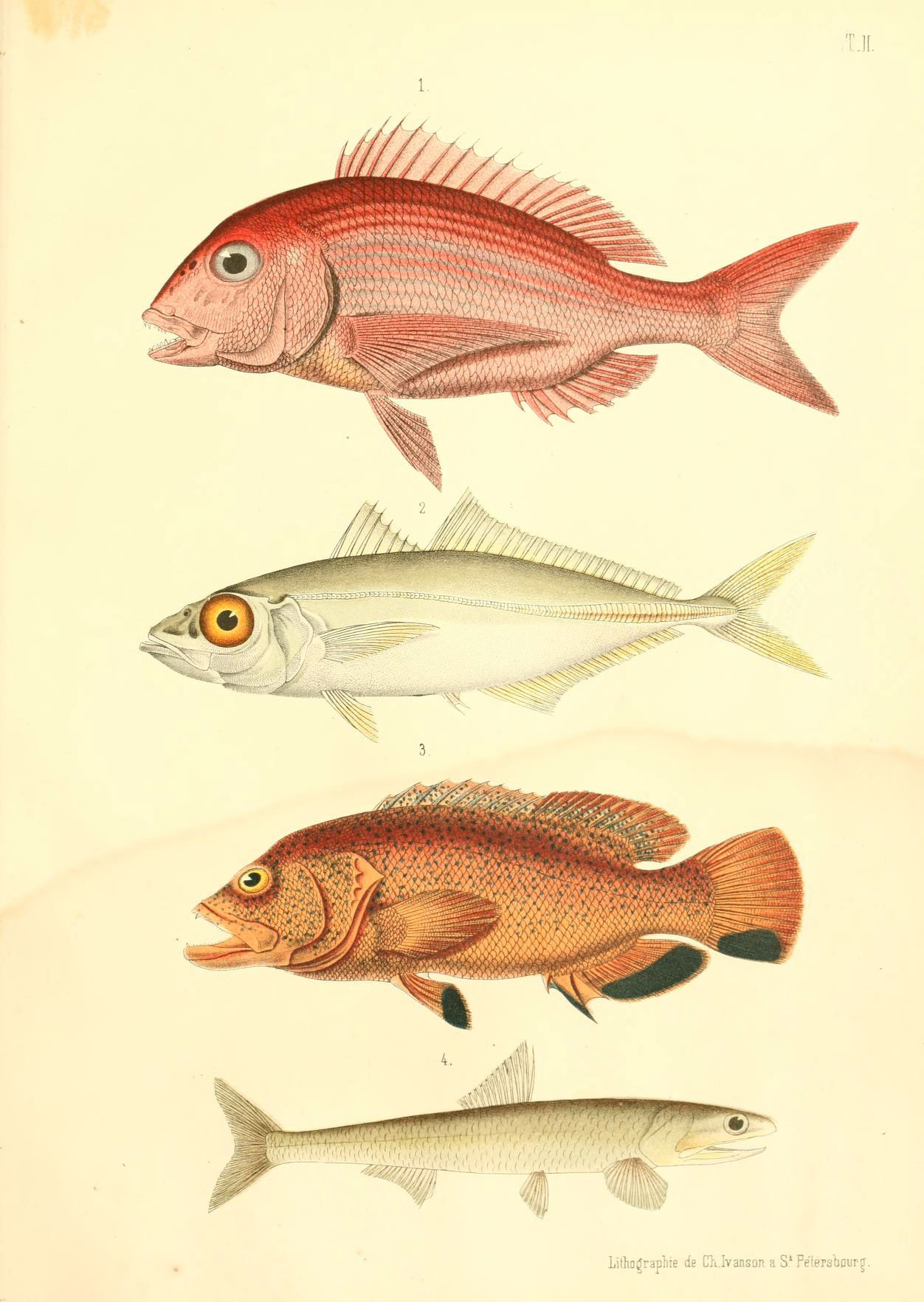 Т.... Lilliotfrapliie de C?i.Ivanson а S'Petersbqurg.